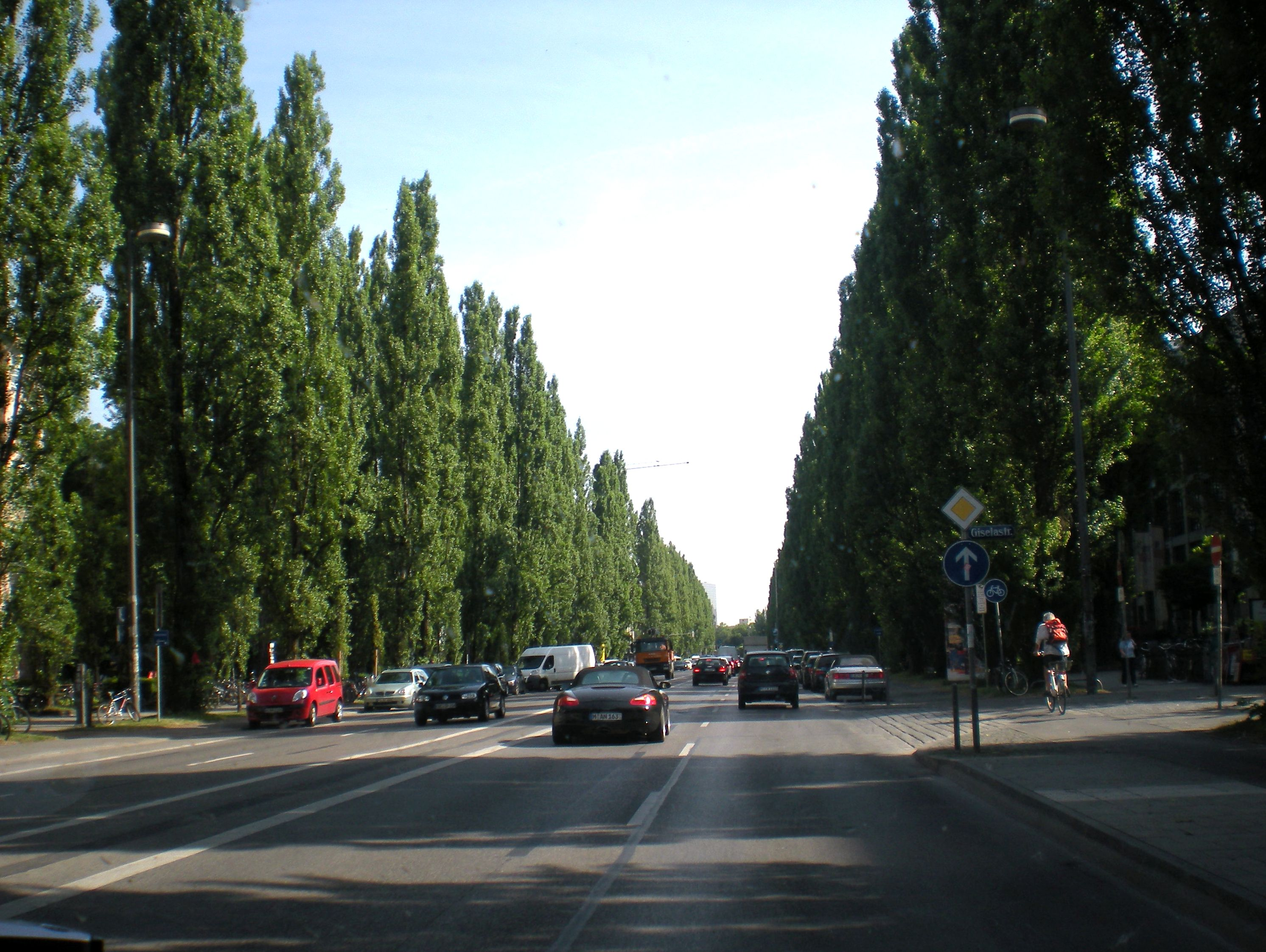 La Leopoldstrasse de Múnich fue diseñada por el arquitecto von Gärtner. Comienza en la Siegestor y se dirige hacia el norte, flanqueada por árboles, constituyendo una de las salidas de la ciudad.